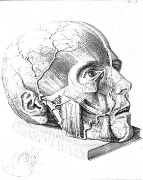 Aus einem Medizinischen Buch von Antonio Scarpa, (1752-1832). Saggio di osservazioni e d'esperienze sulle principali malattie degli occhi. Pavia, Baldassare Comino, von 1801. Kupferstich von Faustino Anderloni Folio (298 x 212 mm.): (pi)2 *2 2*4 a - 2m4; (iv), xi, (i), 278, (2) pp. Engraved frontispiece portrait signed Faustino Anderloni after G. Cattaneo, three full-page engravings (two signed Anderloni), typographic tailpieces